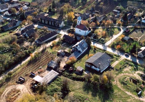 Preĝejo de Bálványos el la supro.